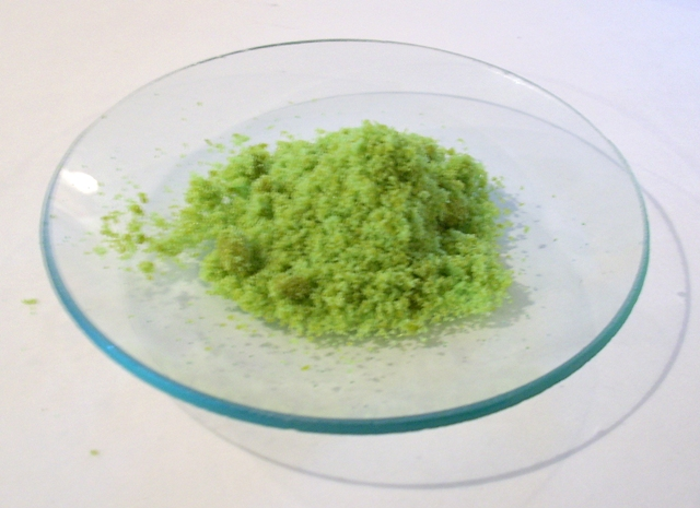 NiCl2